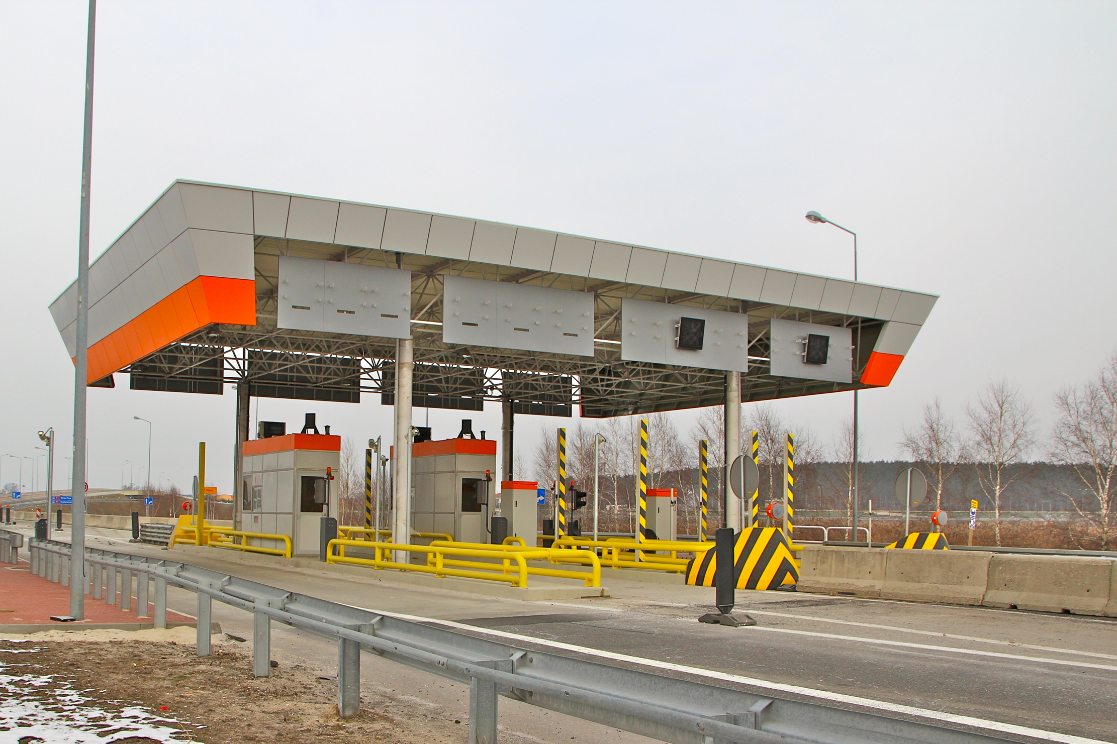 Nieczynna stacja poboru opłat na autostradzie A4 koło Krapkowic.